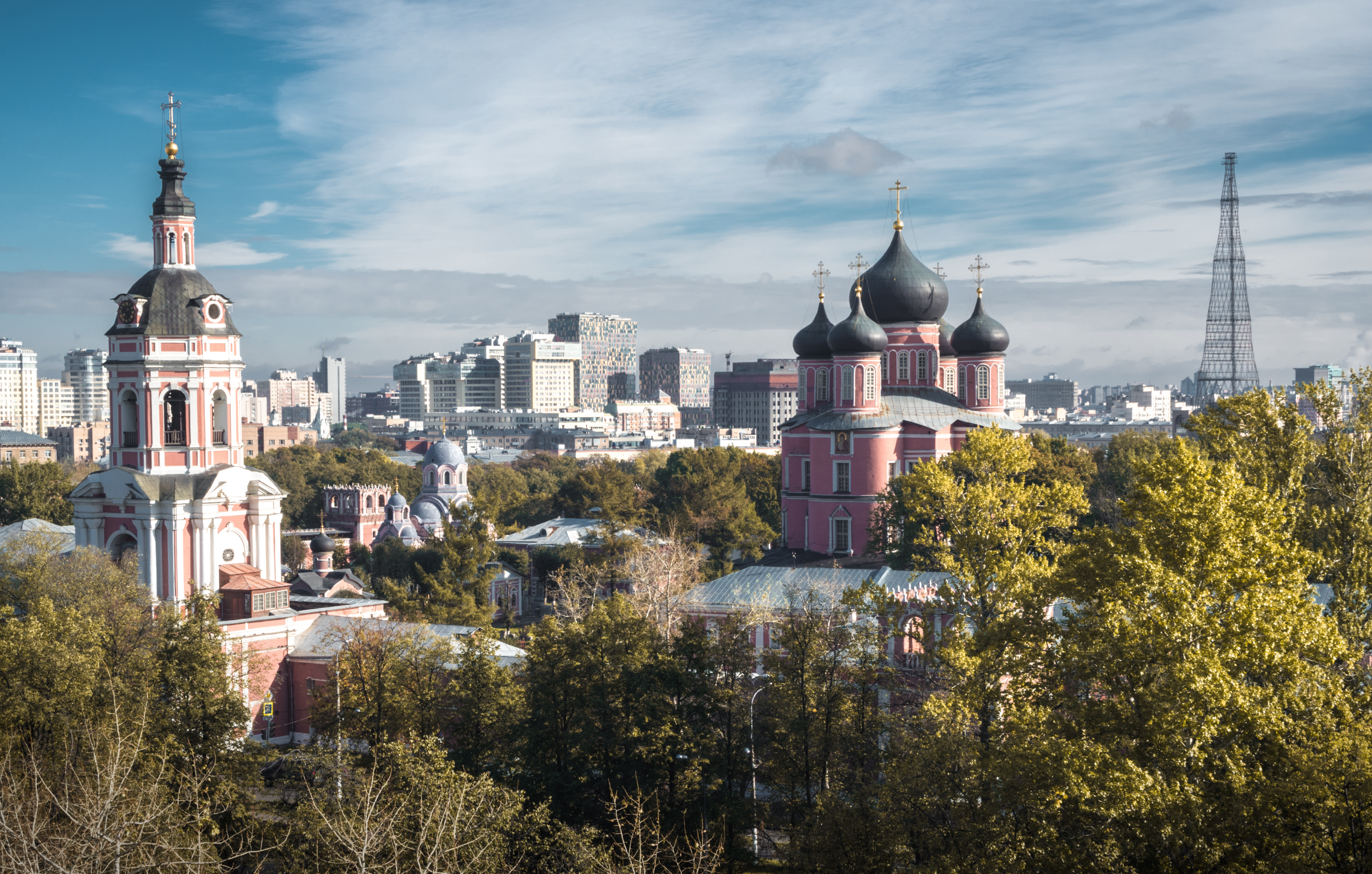 Ансамбль Донского монастыря: Донская пл., Донской, Южный округ, Москва